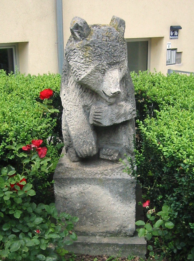 Wien Simmering, Rautenstrauchgasse, Skulptur Bär von Franz Barwig dem Jüngeren